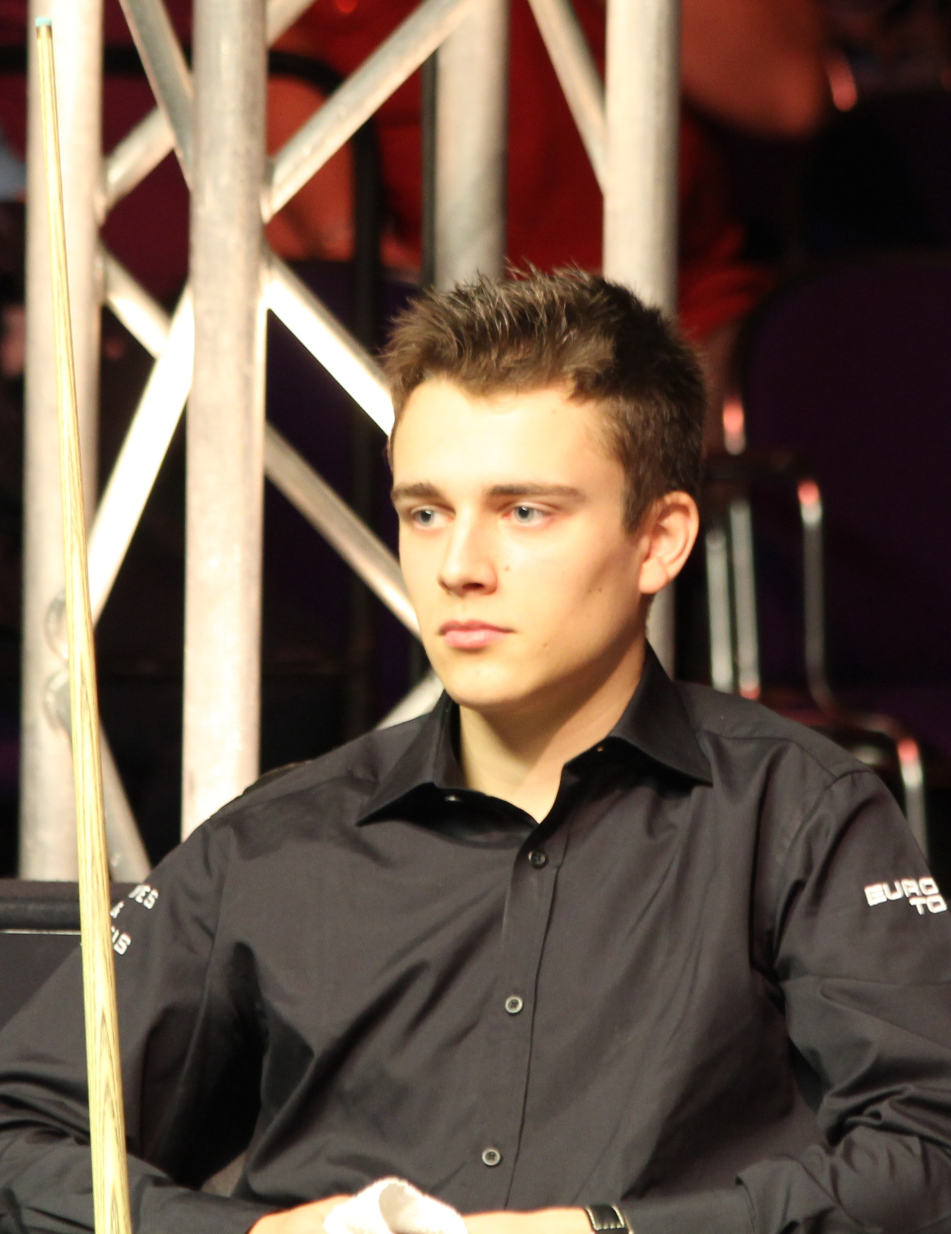 Alexander Ursenbacher beim Paul Hunter Classic 2014